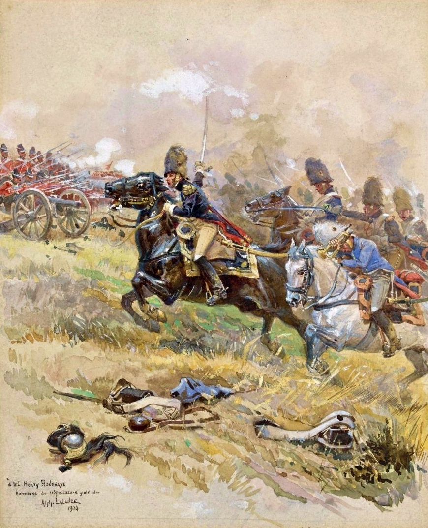 Les grenadiers à cheval de la Garde à Waterloo, 18 juin 1815. Au cours de la bataille, le régiment mène trois charges successives sur le plateau de Mont-Saint-Jean, aux prix de lourdes pertes parmi lesquelles le colonel-major Jamin tué.